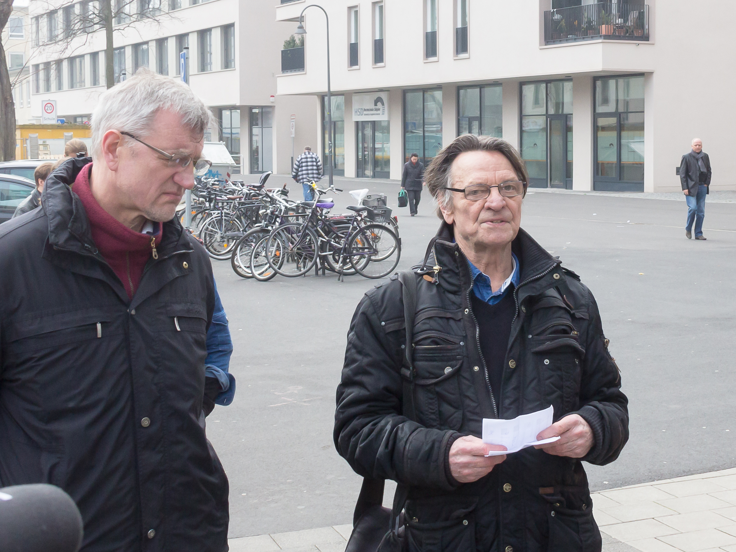 Neuverlegung „Spur der Erinnerung“ am Waidmarkt, Köln Foto: Andreas Hupke (Bezirksbürgermeister) und Kurt Holl (Ehrenvorsitzende des Rom e.V.).